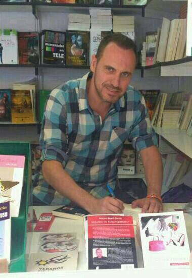 Antonio Bosch Conde en la Feria del Libro de Madrid 2013